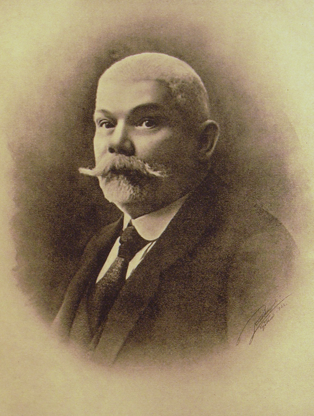 Dr. Jan Venhuda Starosta města Vyškov 1911 - 1924